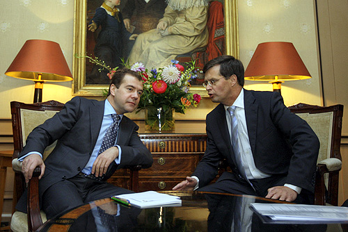 AMSTERDAM. With Dutch Prime Minister Jan Peter Balkenende.